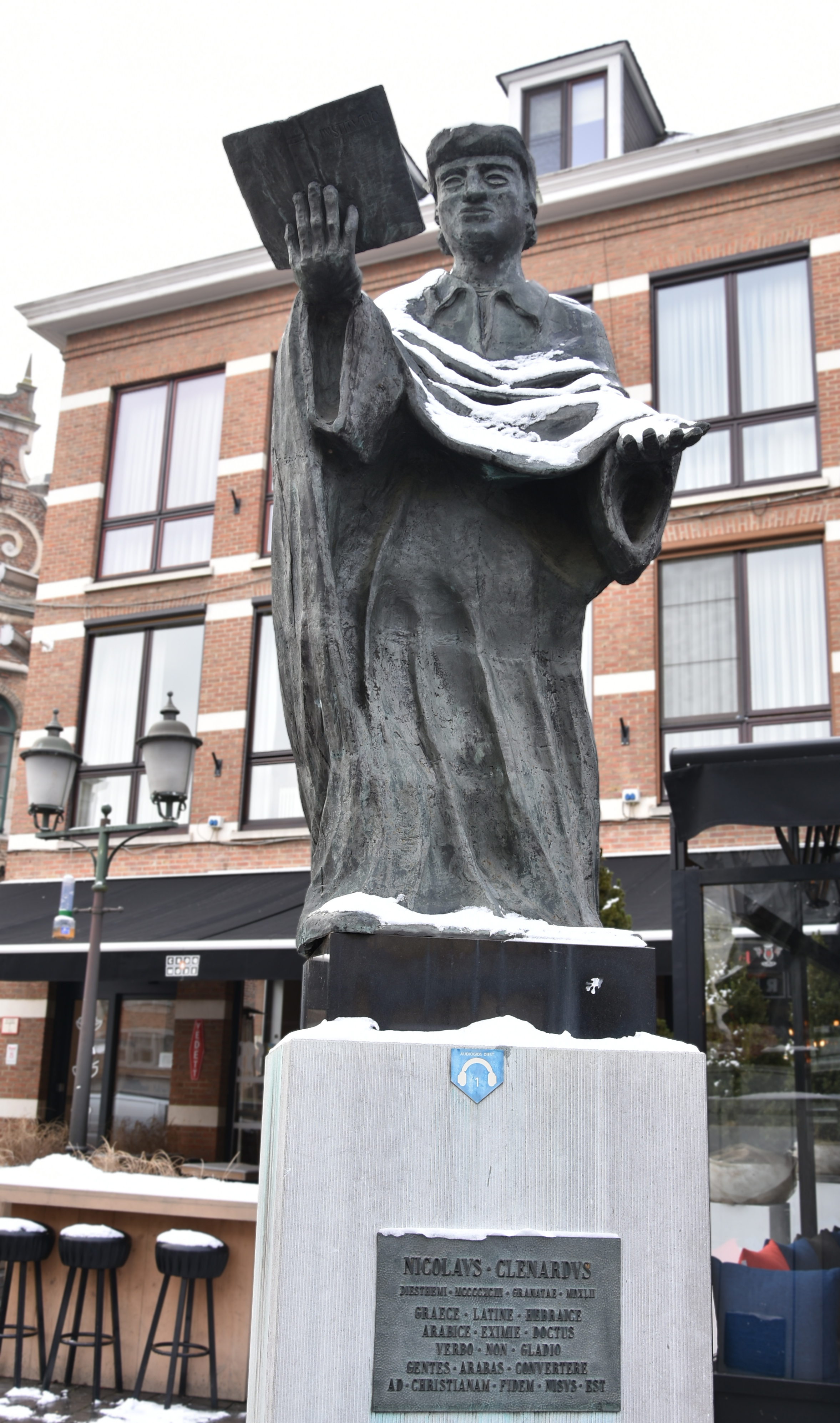 Standbeeld van Nicolaes Cleynaerts Diest 23-01-2019